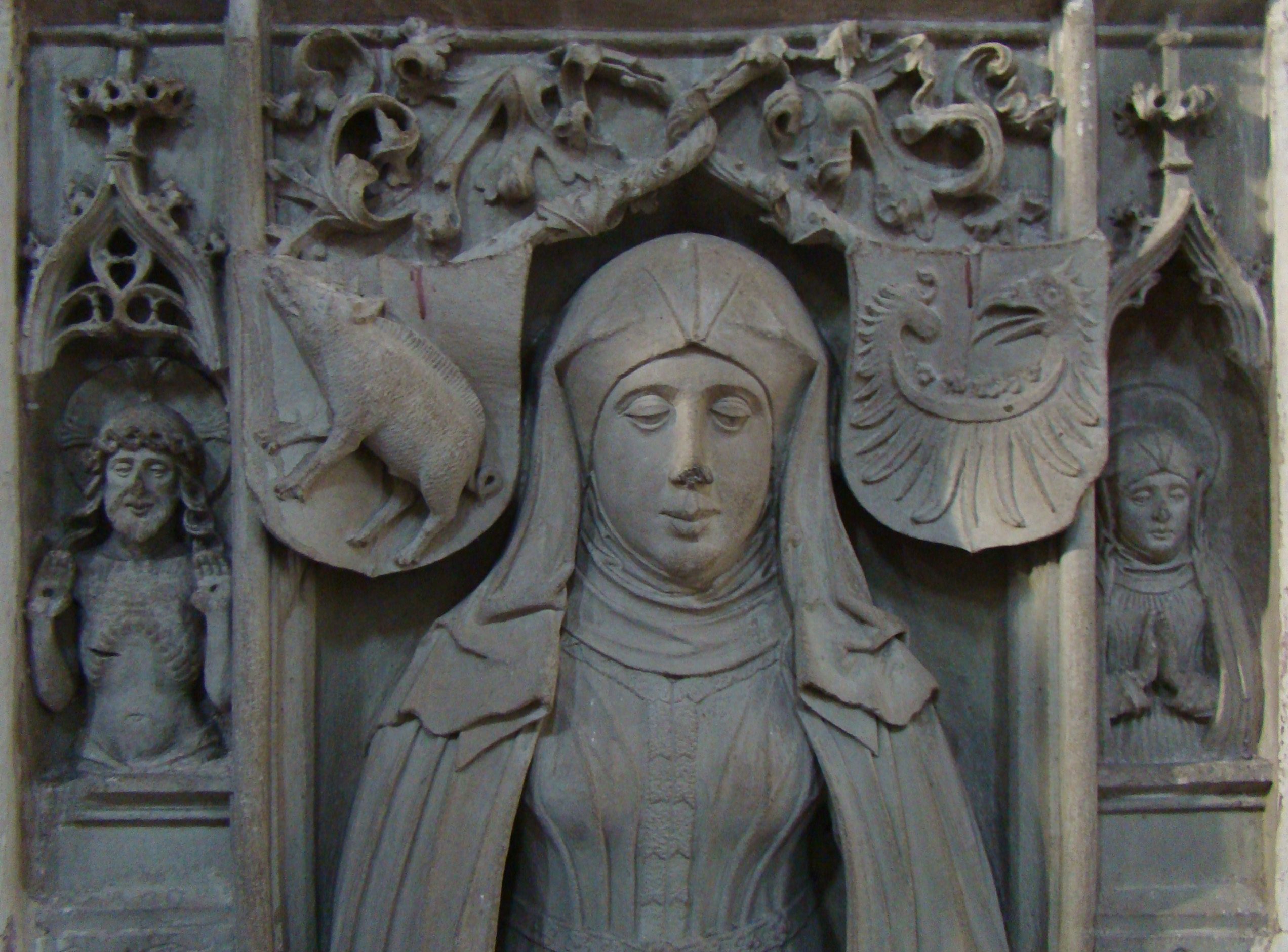 Dominikanerkirche in Bad Wimpfen